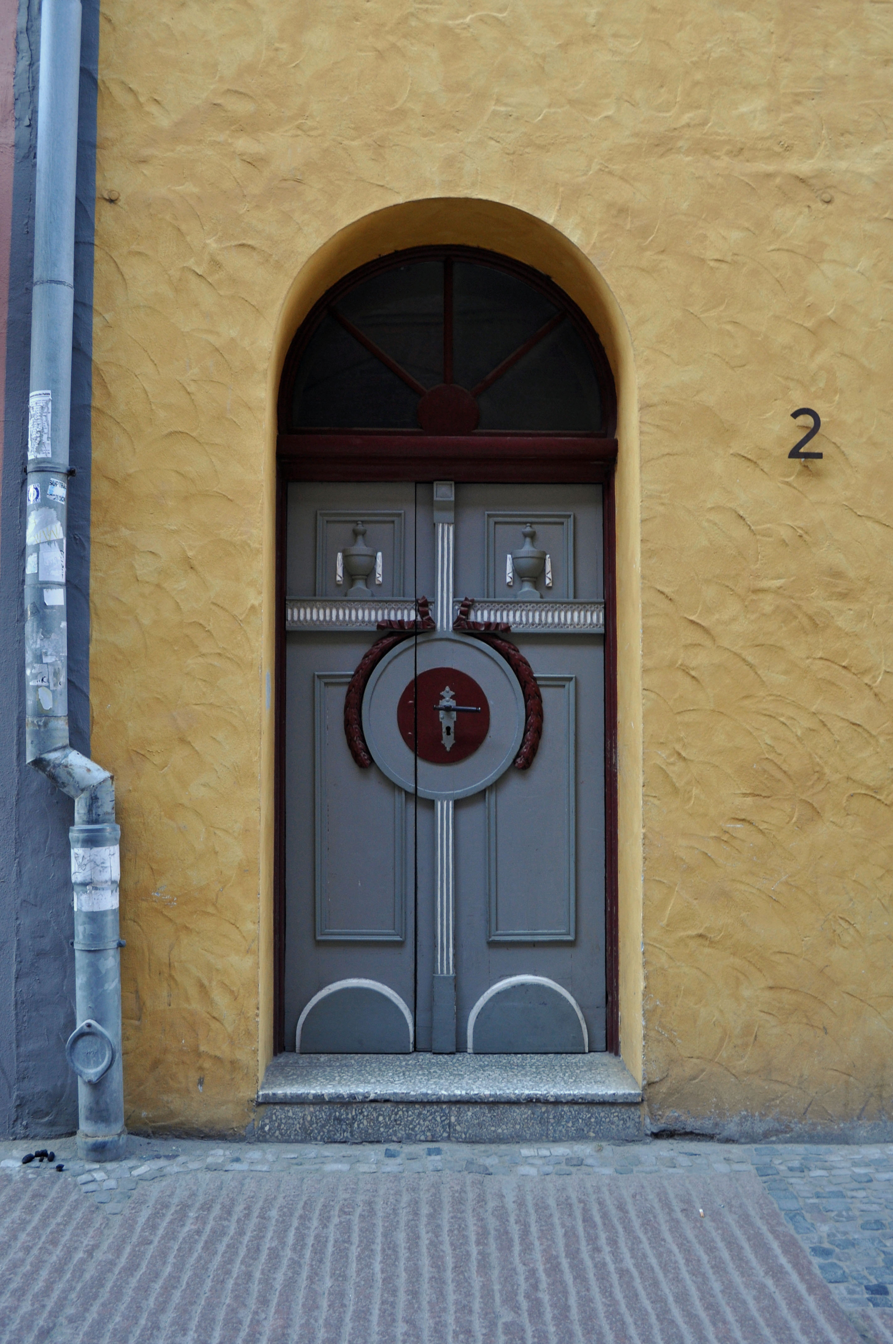 Gebäude bzw. Gebäudedetail in Stralsund. Straße und Hausnummer siehe Dateiname.